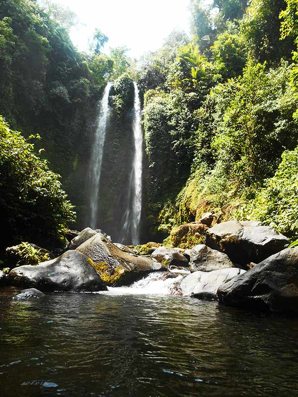 Air terjun Tiu Teja biasa disebut denga Air terjun kembar karena terdapat dua aliran air terjun dengan volume yang cukup besar pada musim penghujan